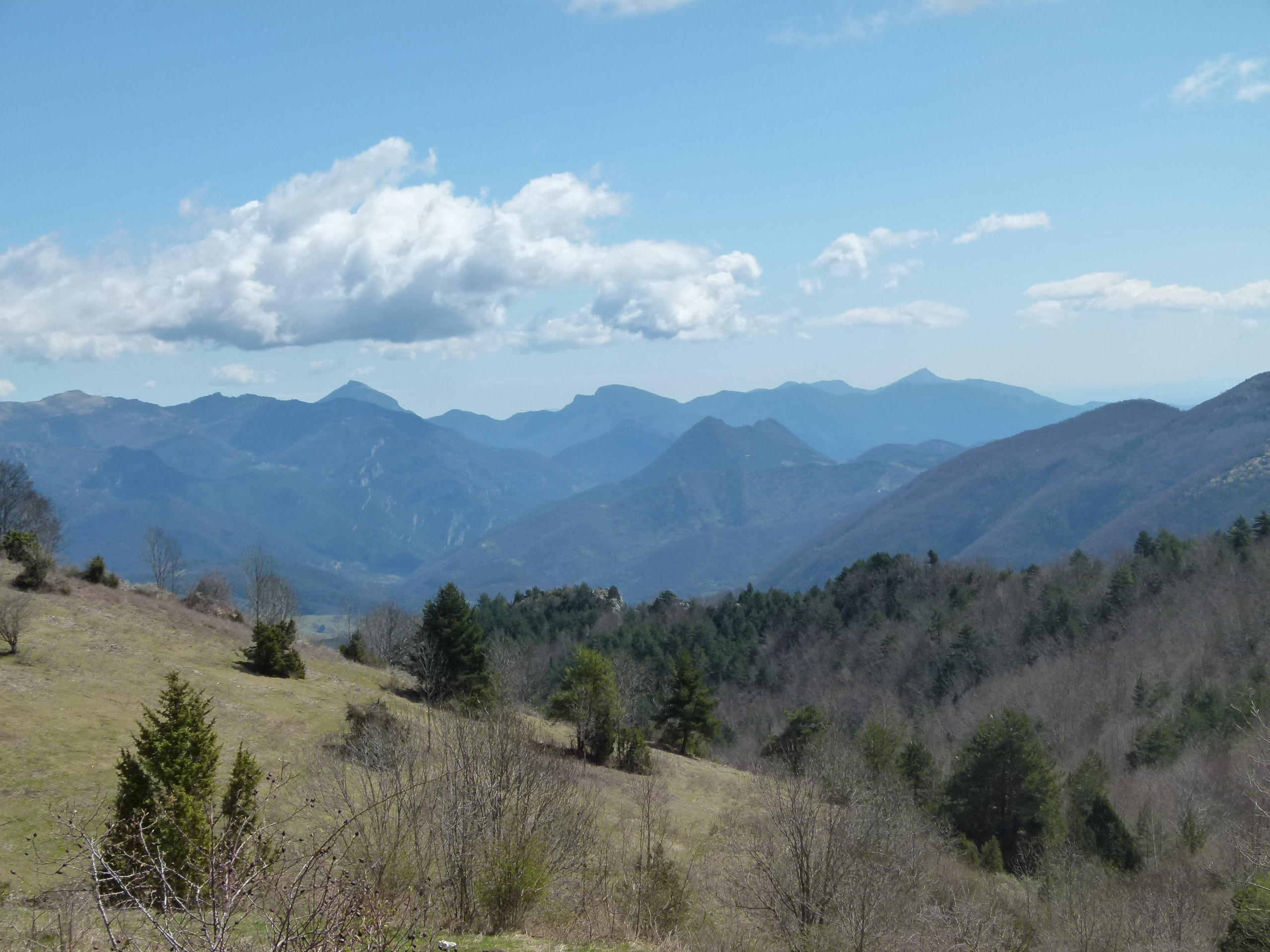 Vista des de St. Antoni (Camprodon) dels cims del Comanegra, Bassegoda, Bestracà -a primer terme- i Mare de Déu del Mont (d'esquerra a dreta)